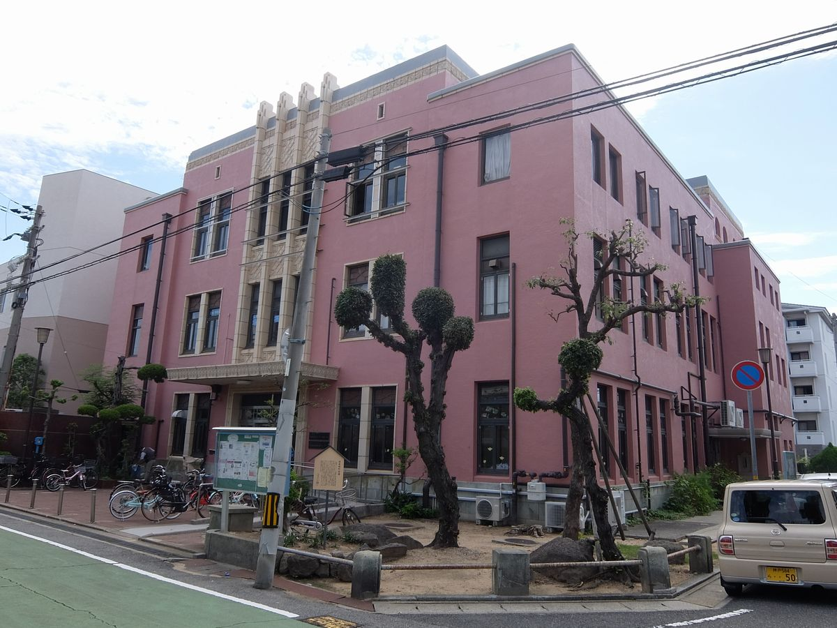 旧魚崎町役場（神戸市東灘区魚崎中町四丁目）。2018年現在は東灘区民センター小ホール。